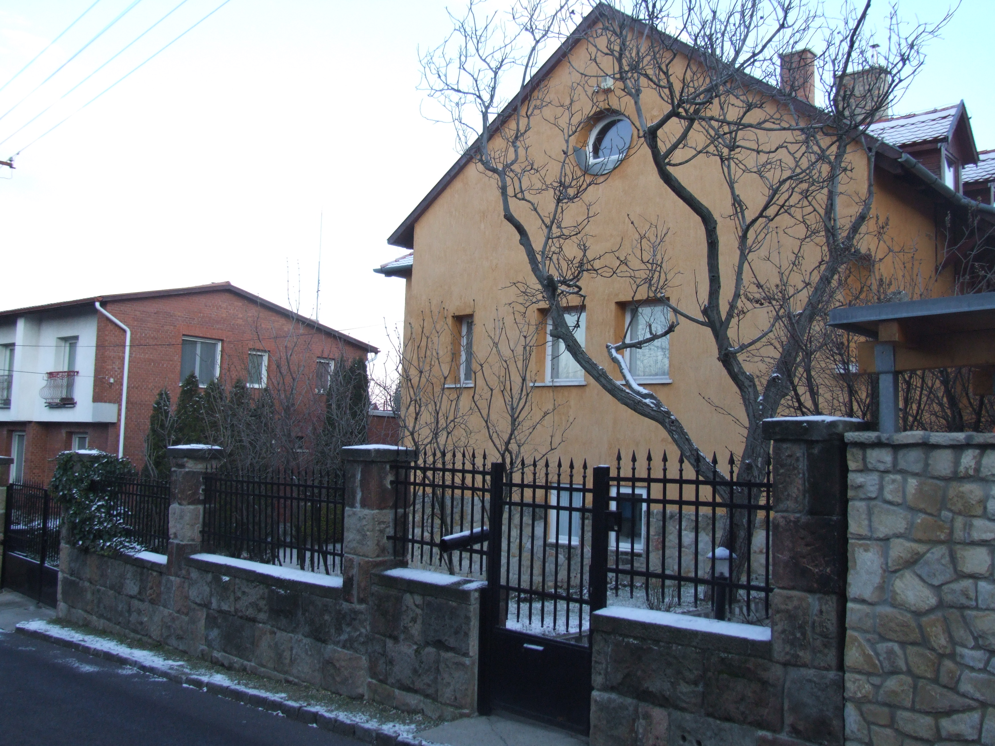 A „Matyóbaba” vendéglő, illetve a művész lakóháza volt ez az épület a XII. kerületi Matyó utcában